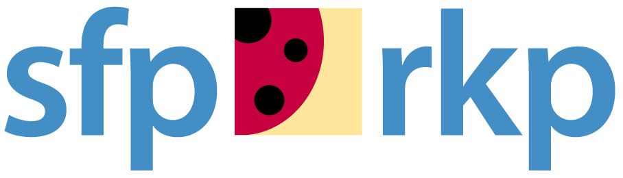 Historisches Parteilogo - Schwedische Volkspartei (RKP)